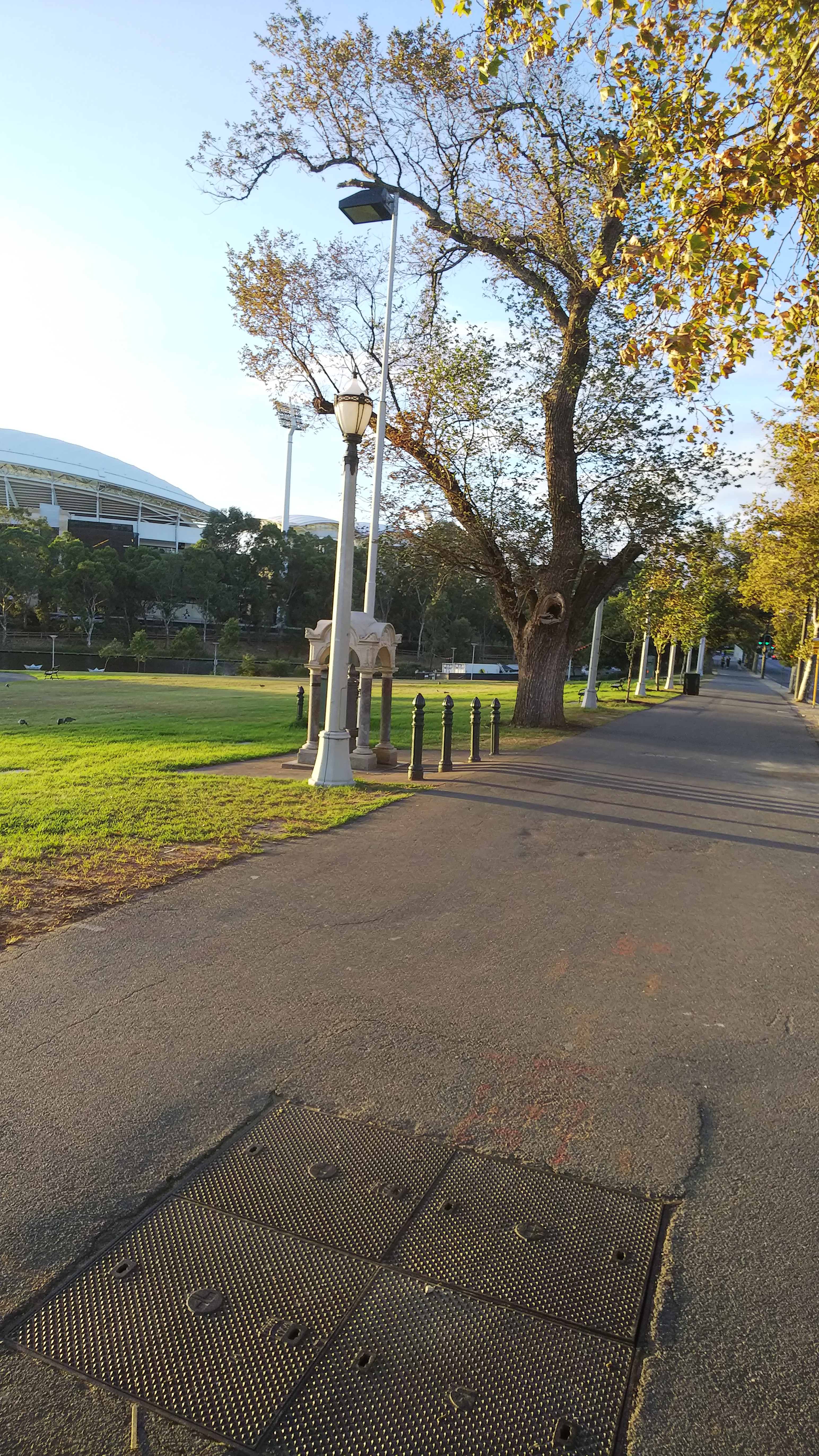 キングウィリアム通りから見たエルダー公園